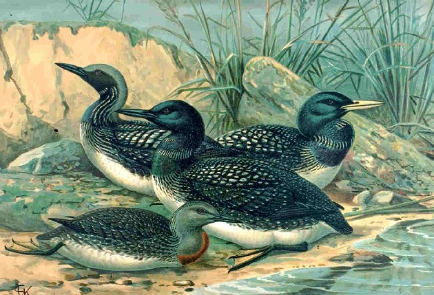 Gavia. Bild aus Naumann, Naturgeschichte der Vögel Mitteleuropas: Band XII, Tafel 13 - Gera, 1903.